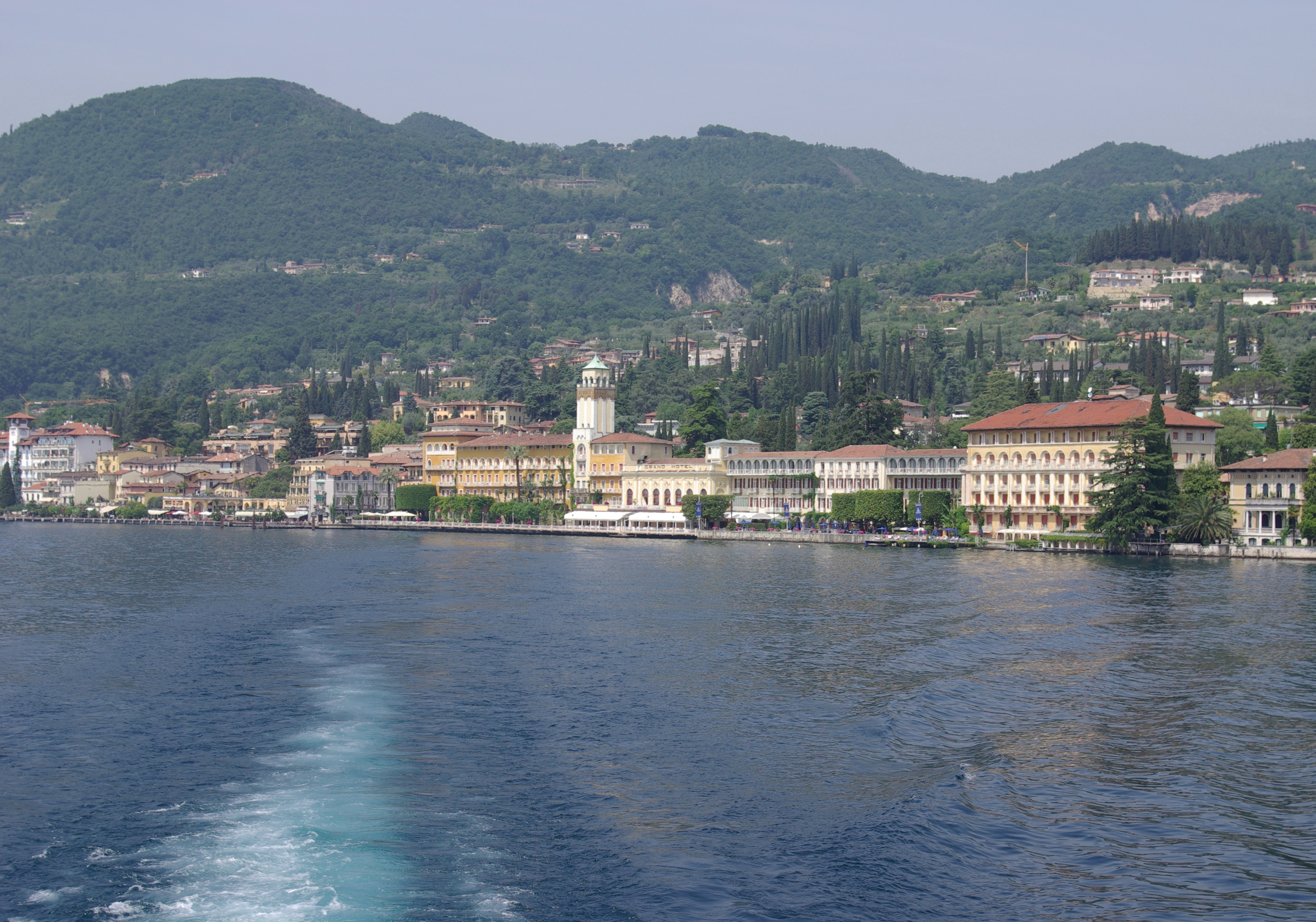 Blick vom Gardasee auf das Grand Hotel in Gardone Riviera